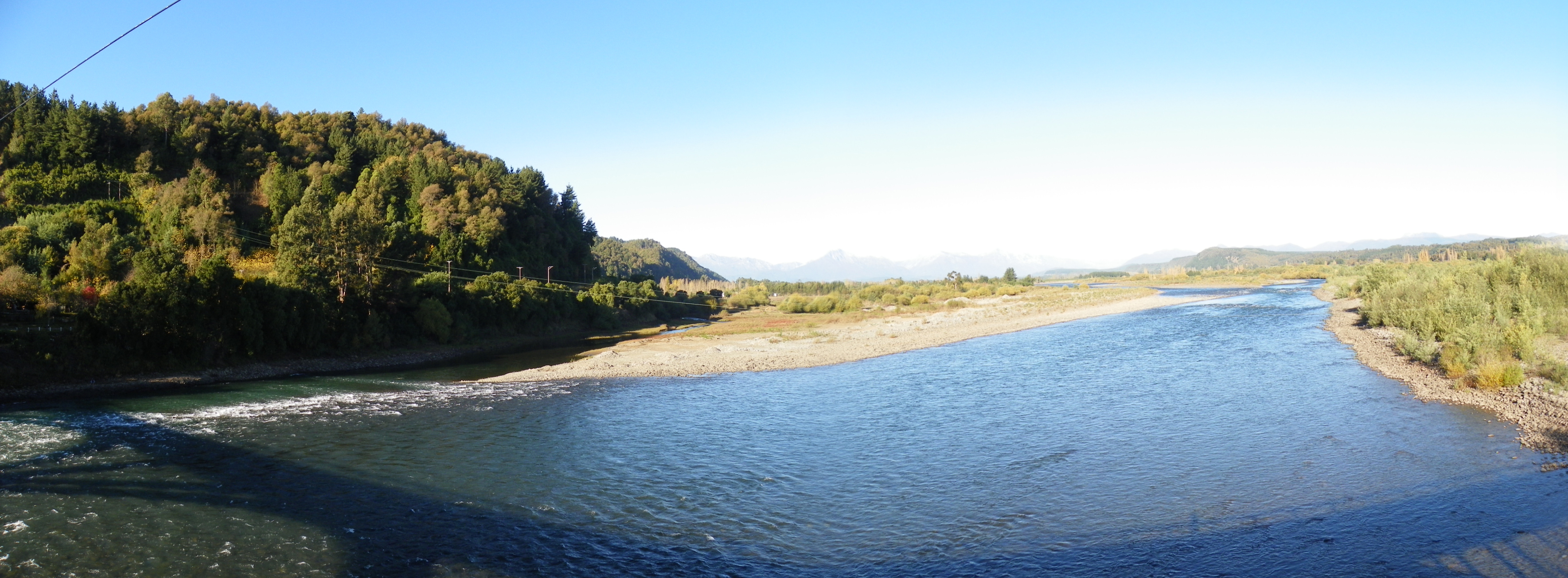 Río Biobío Desde Puente Quilaco. Cámara Kodak Z981